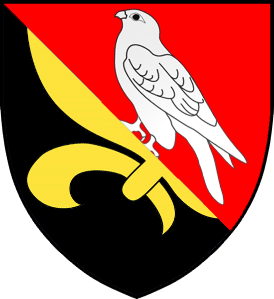 Vapensköld för Haraldh Laake, från en tavla målad på duk med Erik Göstafssons (Stenbock) död 1599, uppräknade förfäder